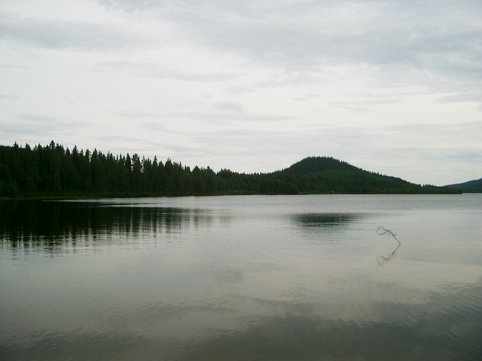 Vy över Bockträsk sjön